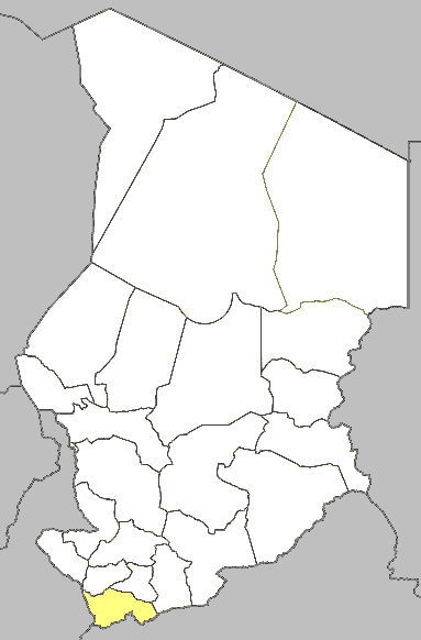 Mappa della diocesi di Goré.